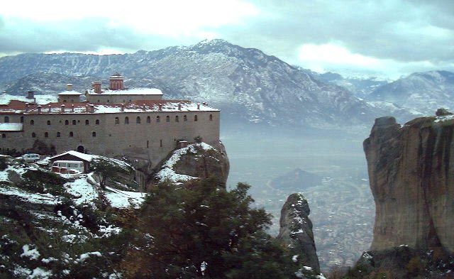 Taken December 2001.